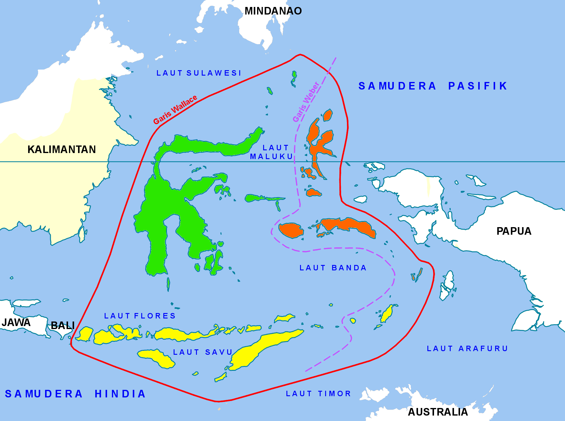 Subkawasan dalam biogeografi kawasan Wallacea Subkawasan Sulawesi: Pulau Sulawesi, Kepulauan Talaud, Sangihe, Togian, dan Sula Subkawasan Maluku: Pulau Morotai, Halmahera, Bacan, Obi, Buru, Ambon, dan Seram Subkawasan Nusa Tenggara: Pulau Lombok, Sumbawa, Flores, Sumba, Timor, dan Kepulauan Tanimbar